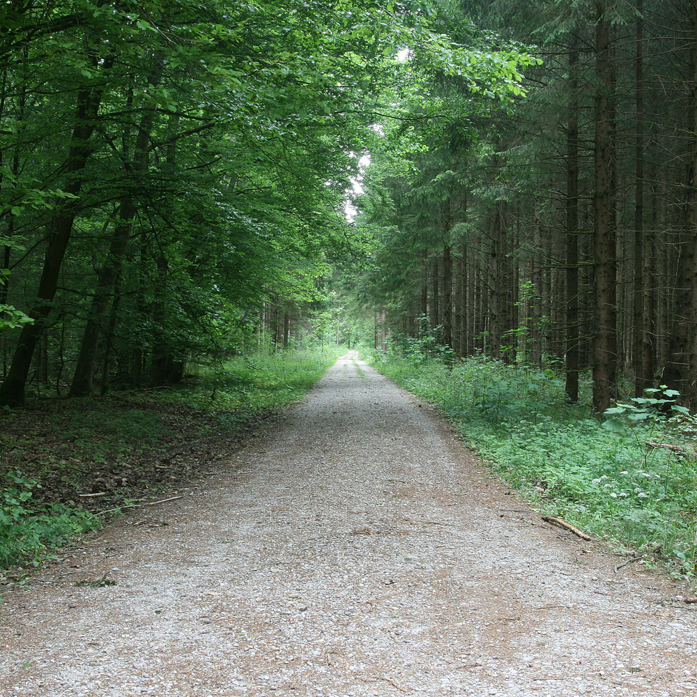 Beschreibung: Typisch für den Perlacher Forst sind die schnurgeraden, fast unendlich erscheinenden Forstwege